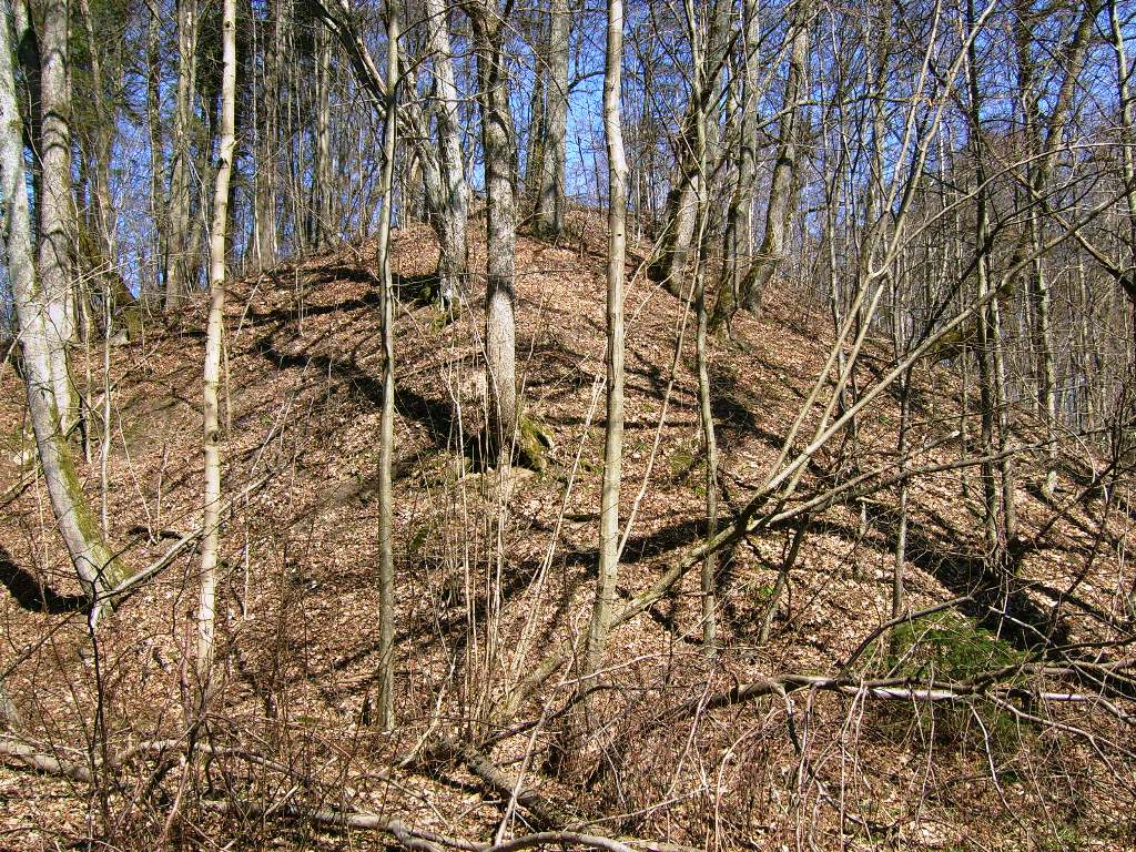 Lileikėnų piliakalnis